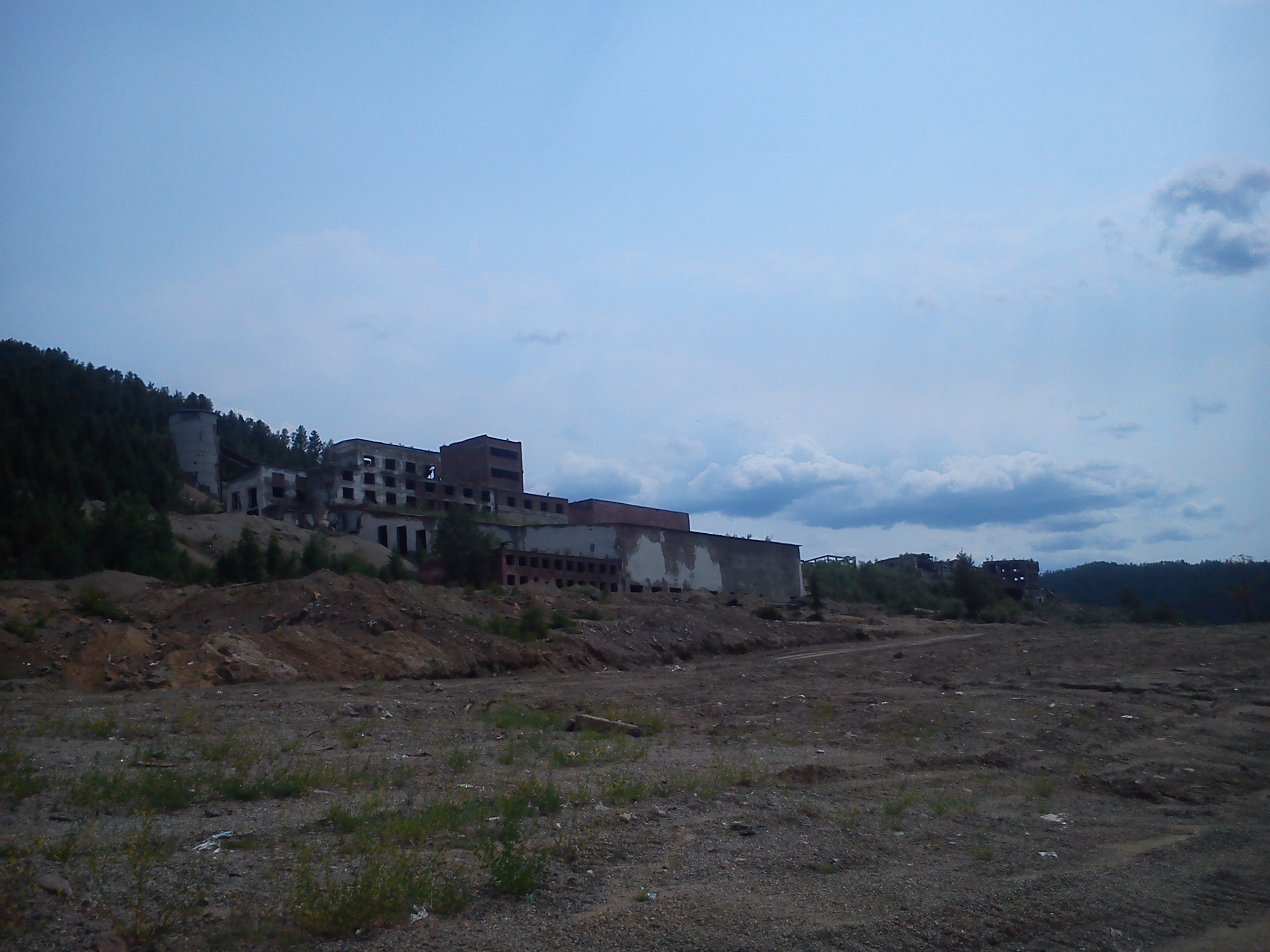 Заброшенные цеха Джидинского вольфрамо-молибденового ГОК.